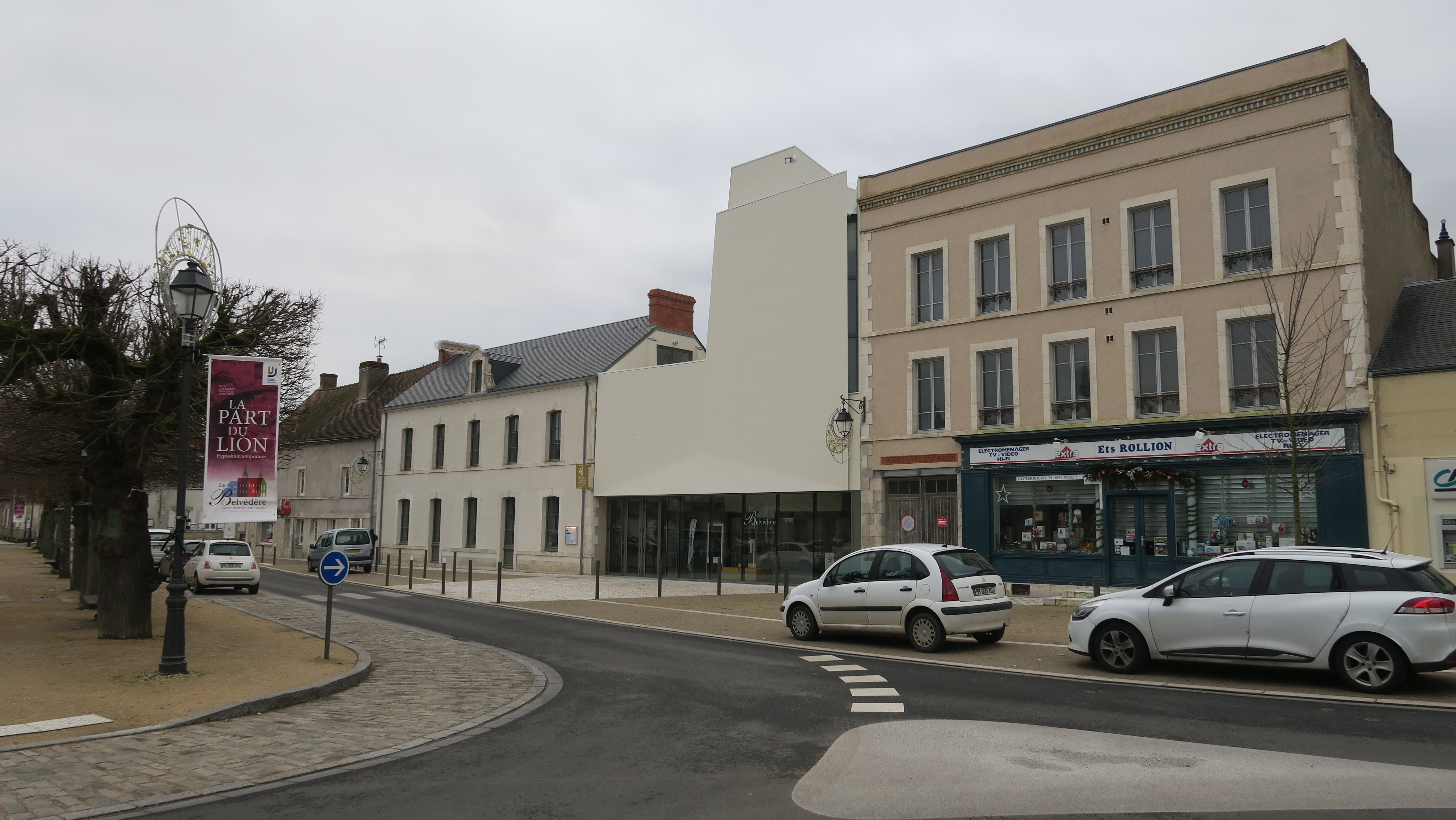 Le Belvédère, Saint-Benoît-sur-Loire, façade sur la place du Matroi